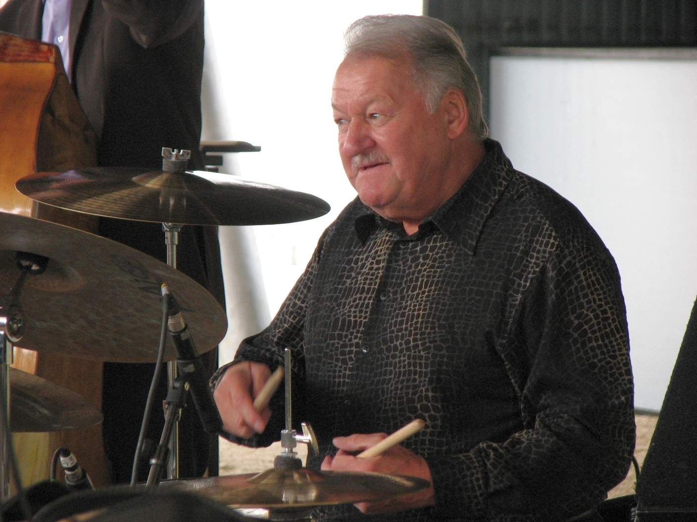 Charly Antolini in Bonn